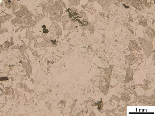 granofiro. nicol paralleli